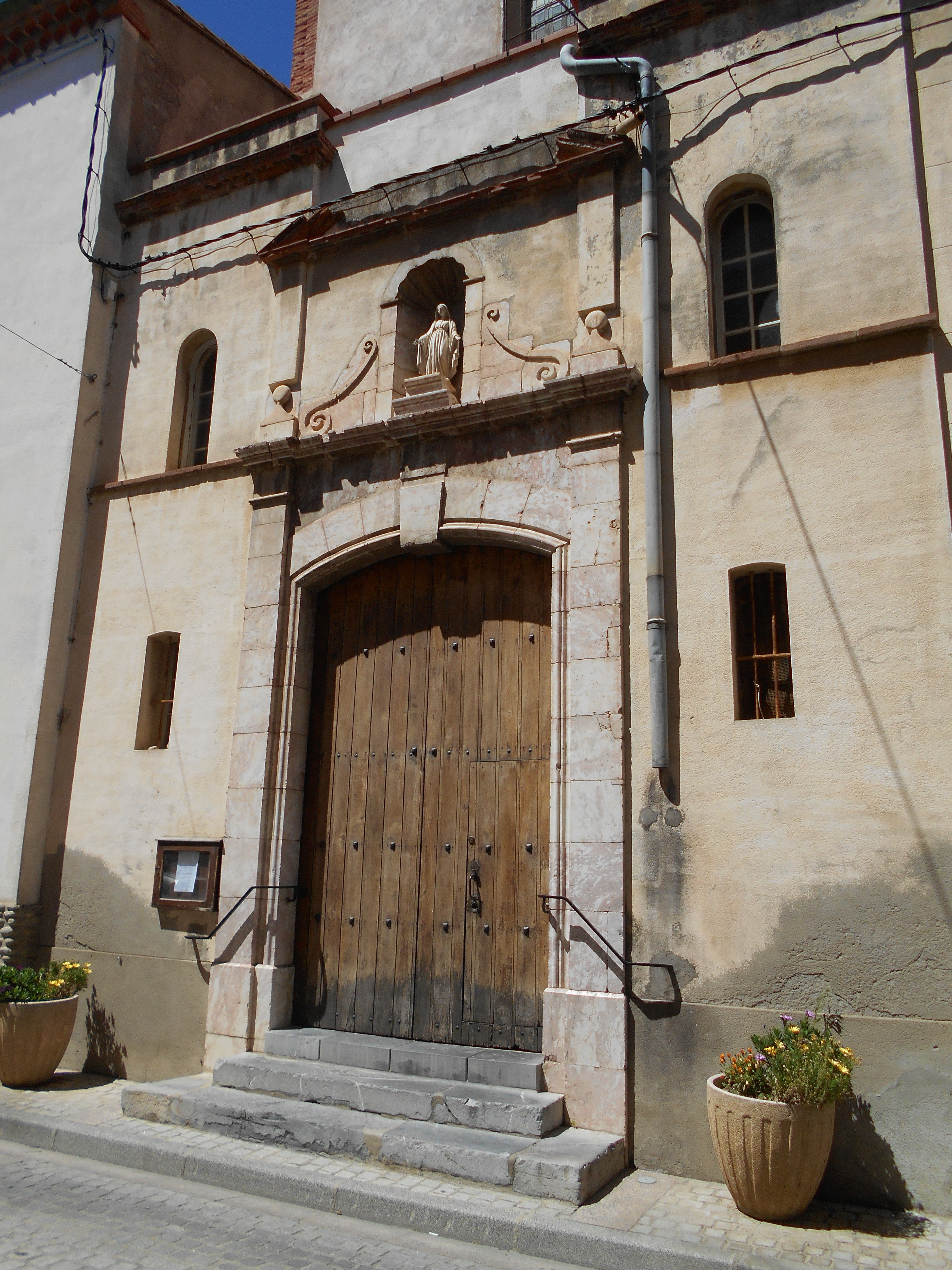 Façana principal, meridional, de l'església.